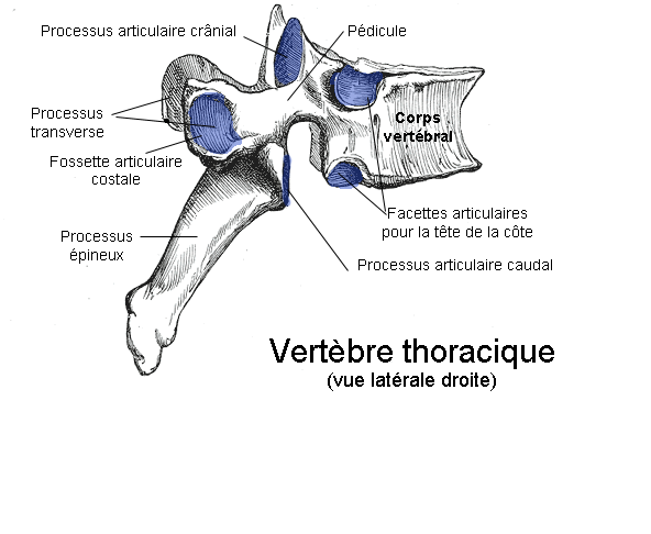 Vertèbre thoracique. Anatomie humaine